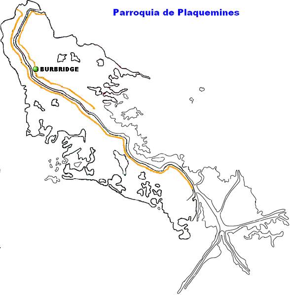 Burbridge, Louisiana